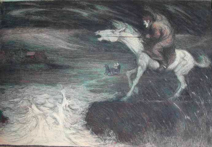 Franz Karl Basler-Kopp: Schimmelreiter I; Kreide auf Papier, 47x68 cm; Privatbesitz in Luzern